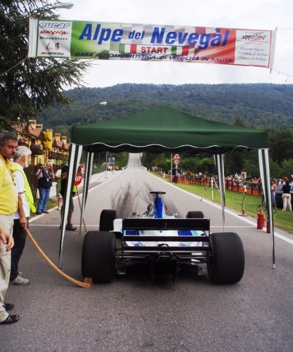 Partenza gara Alpe del Nevegàl 2009: Denny Zardo su monoposto Reynard F.3000.